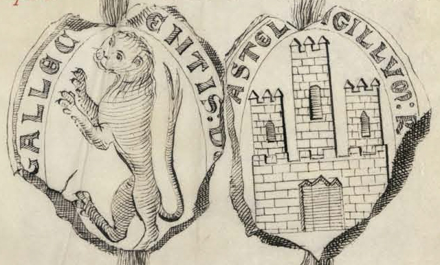 Selo de cera de Berengaria de Castela, raíña consorte de Galiza e León (1197-1204) e rexente de Castela e Toledo (1214-1217), nun contrato en Burgos. Lenda: …entis D… Gallec… / …igillvm R… …astel…